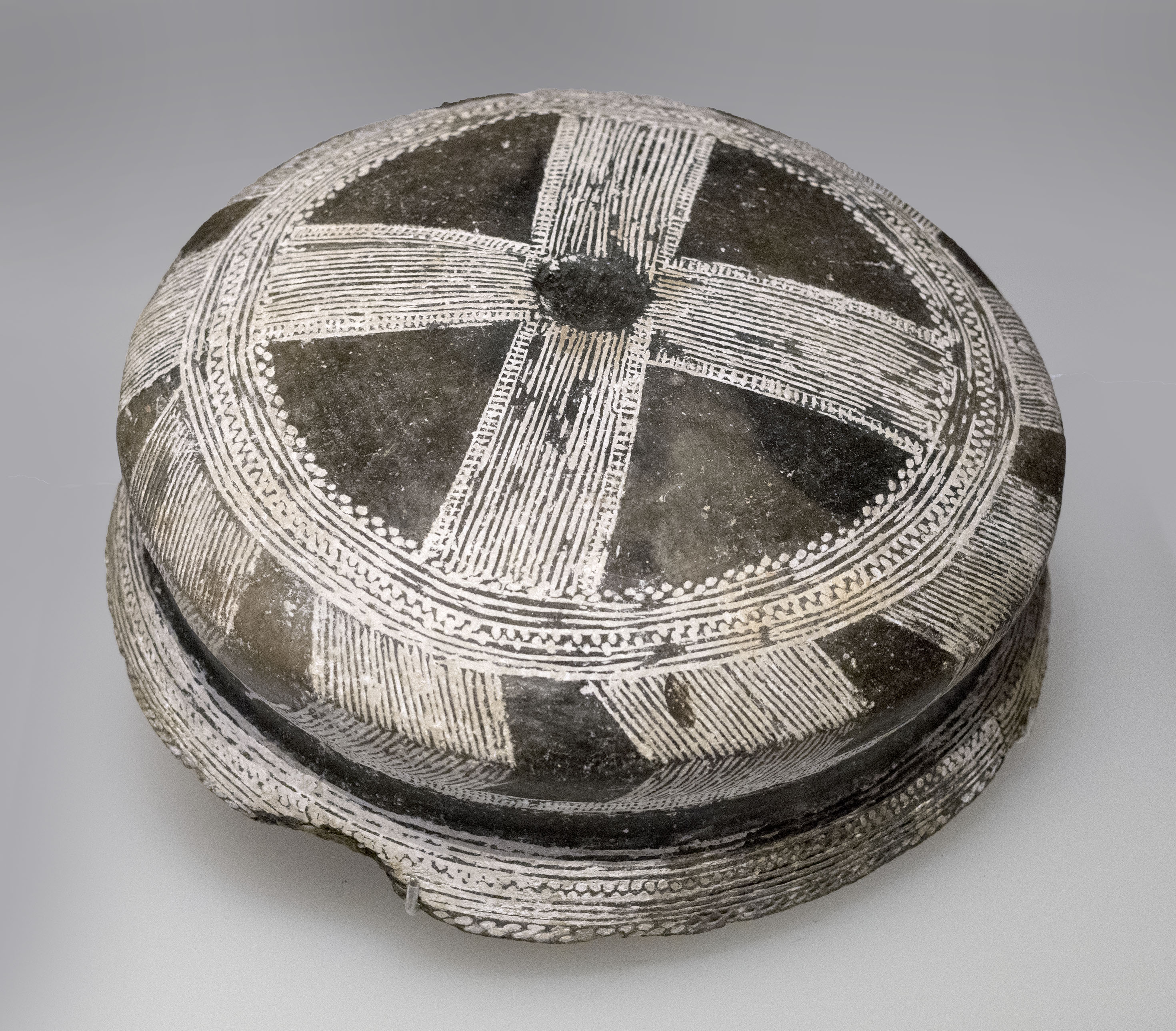 Cazuela en arcilla, bruñida y puntillada de unos 21 cm de diámetro (se muestra invertida). Procede de la necrópolis de Ciempozuelos, en Cuesta de la Reina, Madrid. Datada en el periodo 2200-1500 a.C. Inventario 32253.